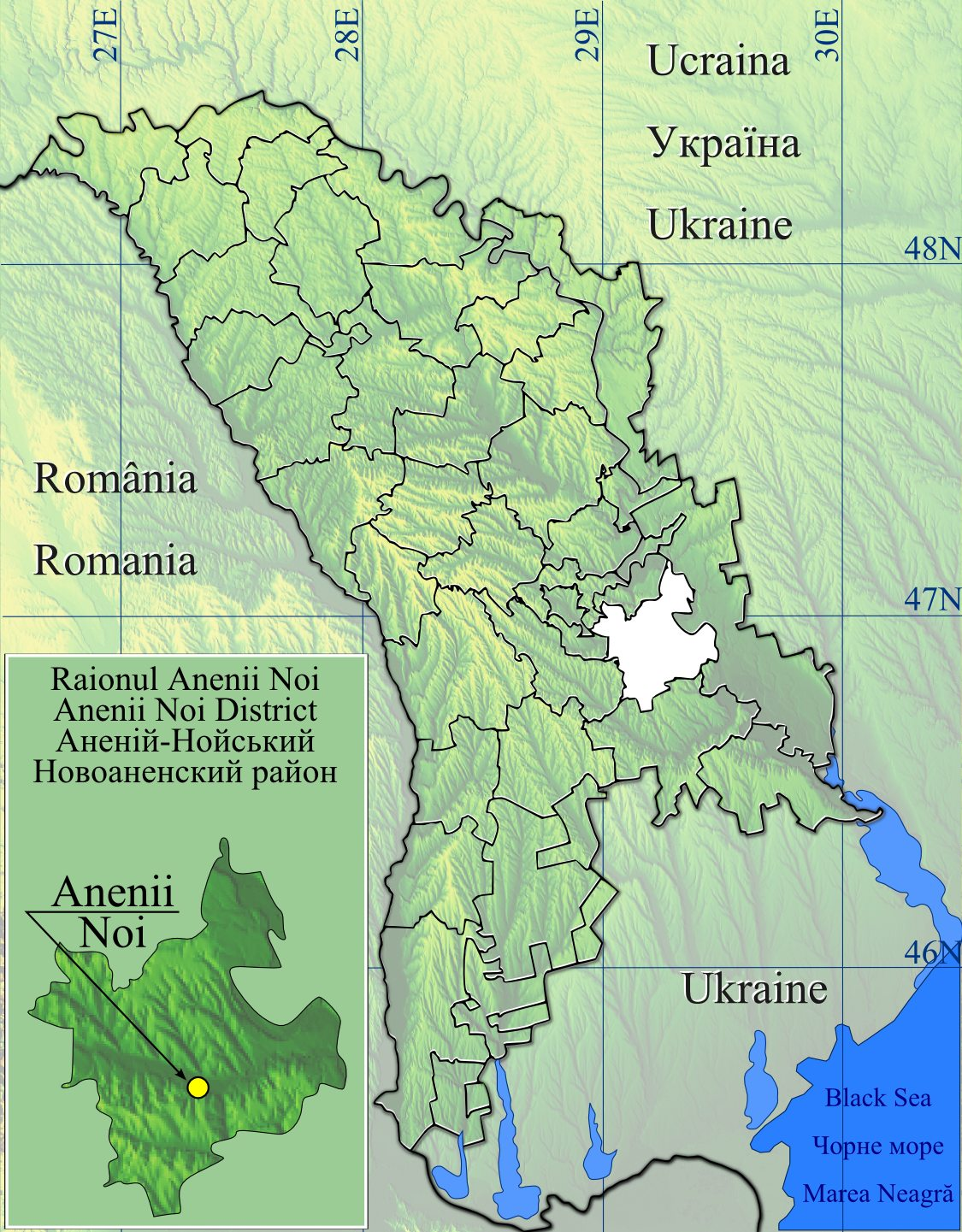 Raionul Anenii Noi. Harta calibrata cu coordonatele: 48.75N / 26.5E, 45.25N / 30.5E